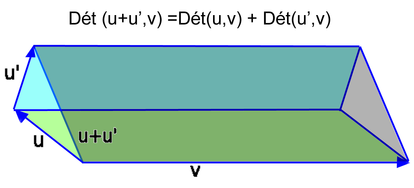 Image du déterminant de la forme det(u+u',v) = det(u,v) + det(u',v). Illustration de la multilinéarité.